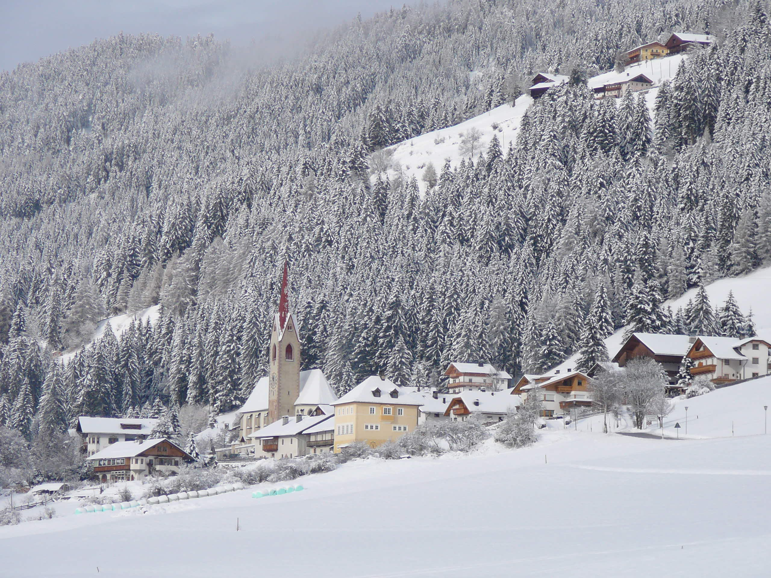 Santa Maria - Dobbiaco